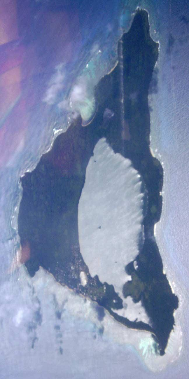 Nomuka island, Haʻapai, Tonga